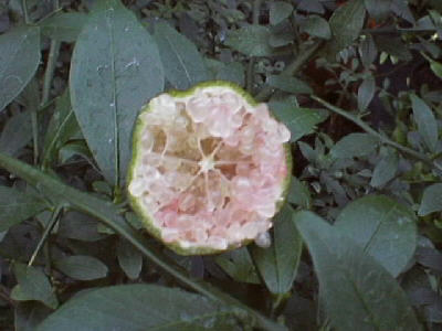 Angeschnittene Frucht der roten Fingerlimette